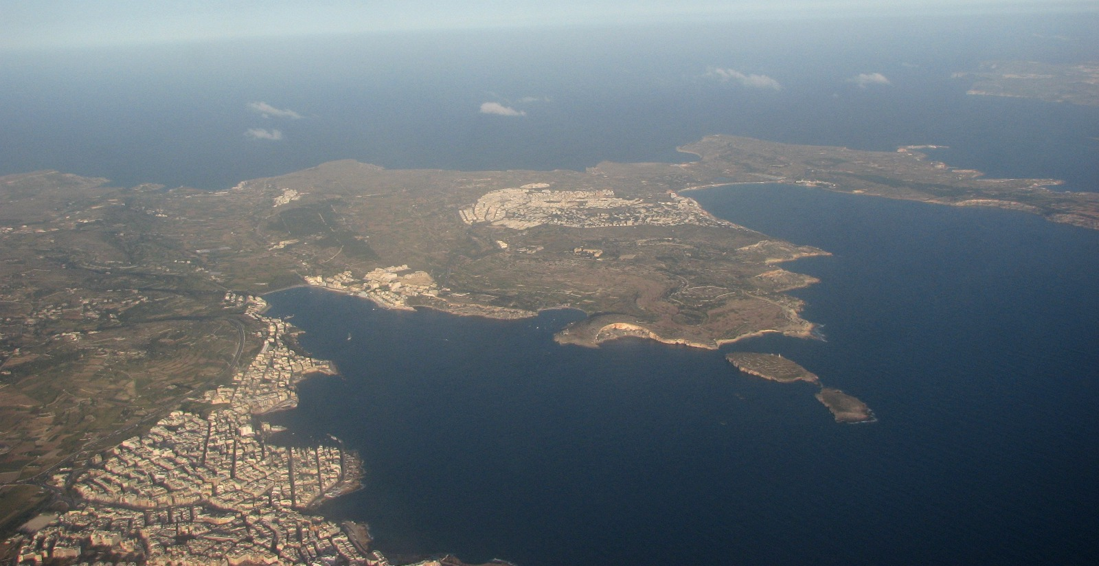 Autoriaus nuotrauka, 2008.04.22. Maltos šiaurė. Priešais Šv. Pauliaus ir Mellieha įlankas. Ant kalvos (toliau) - Mellieha miestas, šalia (apačioje) - Qawra. Tolumoje dešinėje matosi Gozo salos dalis. Nuotrauka gali būti platinama pagal GFDL licenciją.